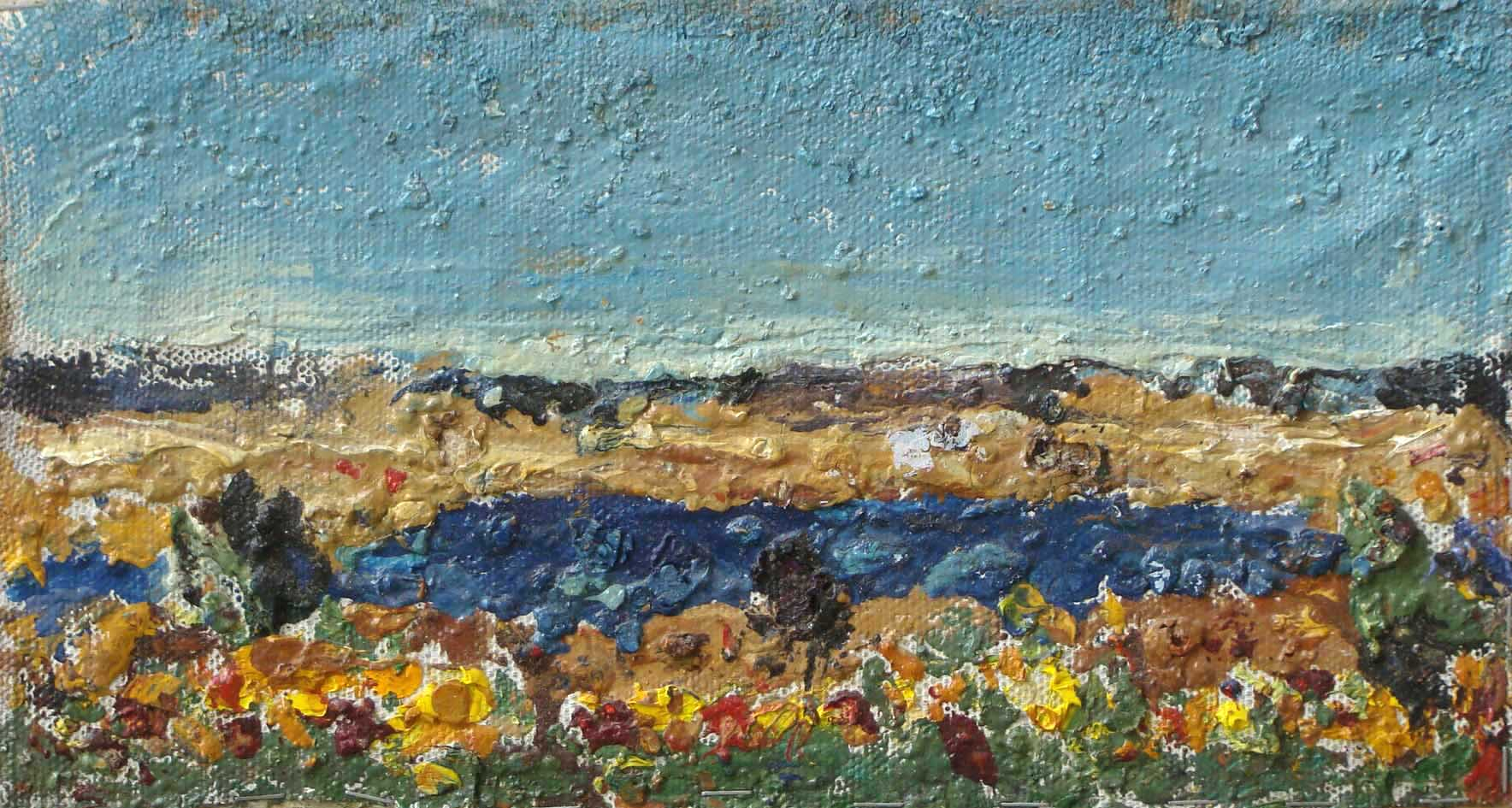 Борис Аракчеев. «Чистое небо», 2007. Холст, масло. 18 х 34 см.